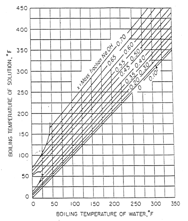 Température d'ébullition des lessives de NaOH en fonction de la température d'ébullition de l'eau.